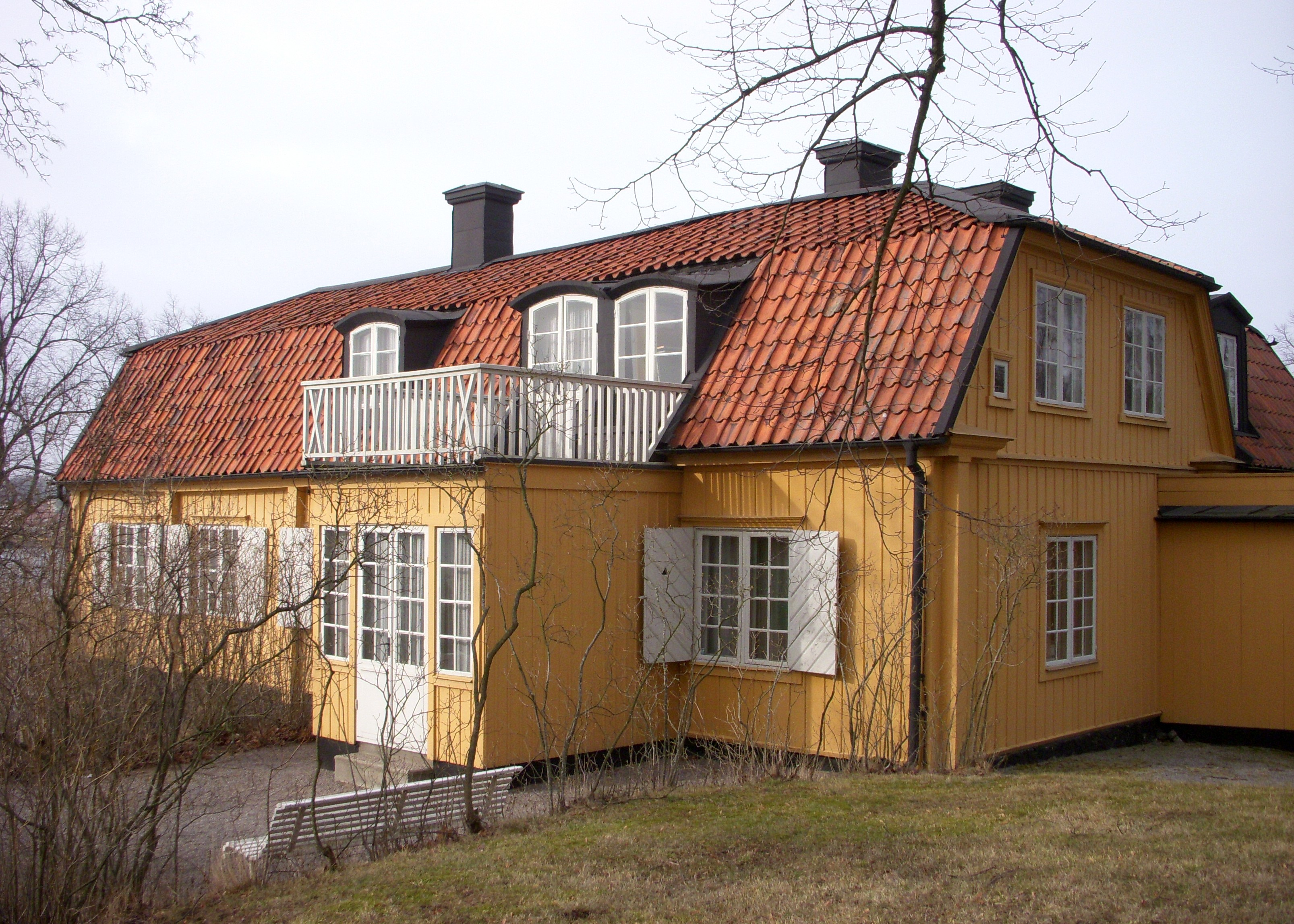 Waldemarsudde, "Gamla huset" även "Gula huset"